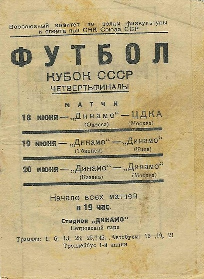 Кубок СССР 1937. 1-4. 20 июня 1937. Динамо (Москва) - Динамо (Казань)